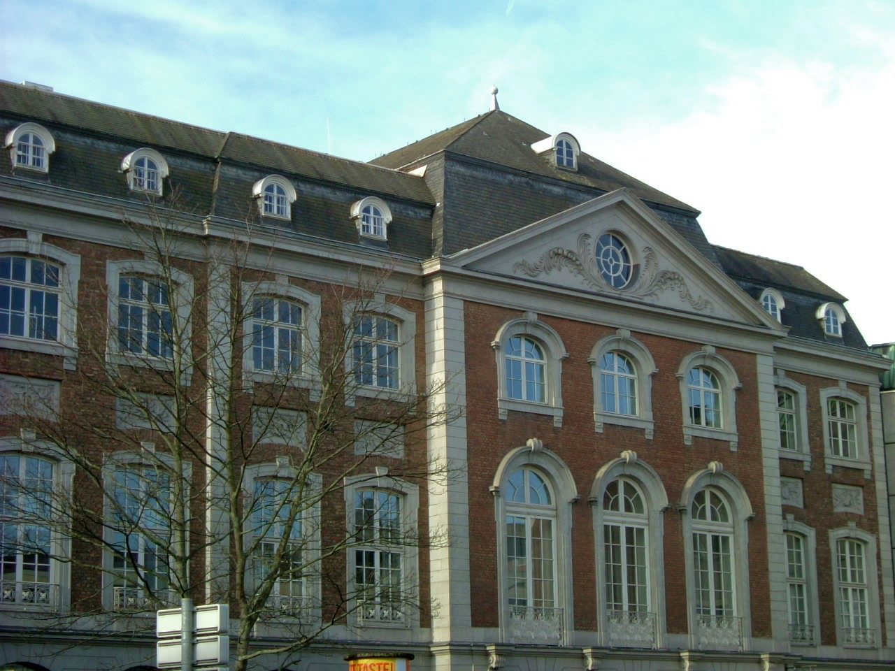 "Gartenansicht" des Alten Kurhauses [von der heutigen Kurhausstrasse gesehen]